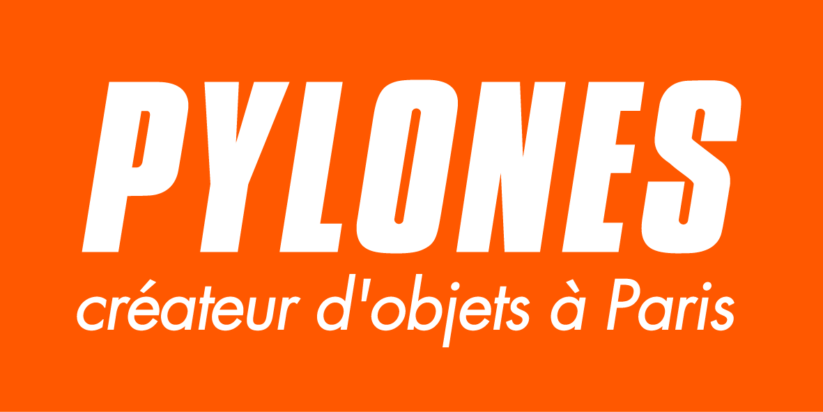 PYLONES logo